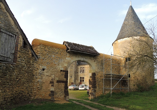 Manoir de la Chevallerie, portail d'accès et tour ronde, pelouse au devant et fenêtres à meneaux et tour octogonale au second plan